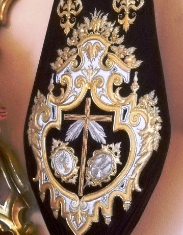 Escudo que aparece en el Bacalao de la Agrupación Parroquial de la Milagrosa